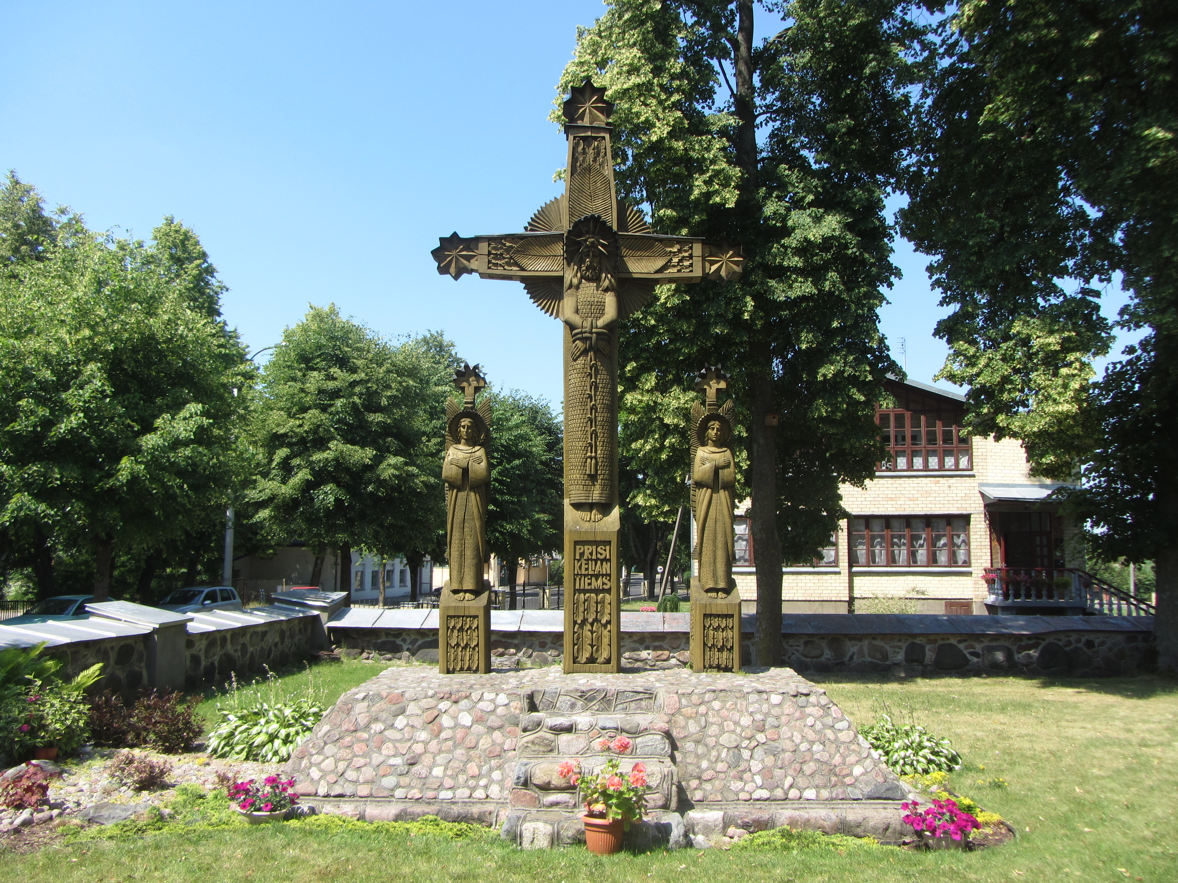 Širvintos, Lithuania